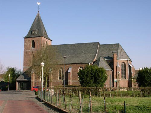 Kath. Pfarrkirche zu Prummern